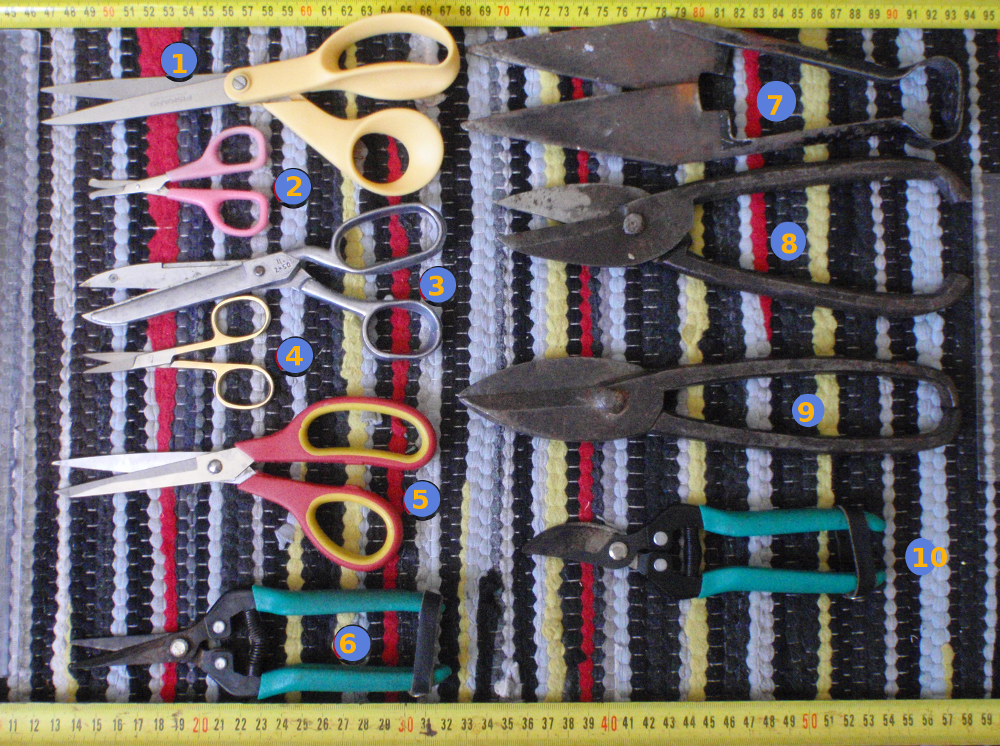 Valik kääre eesti kodus 2008 aasta suvel